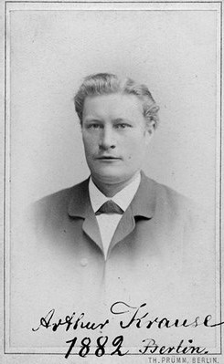 Porträtfotografie von Arthur Krause